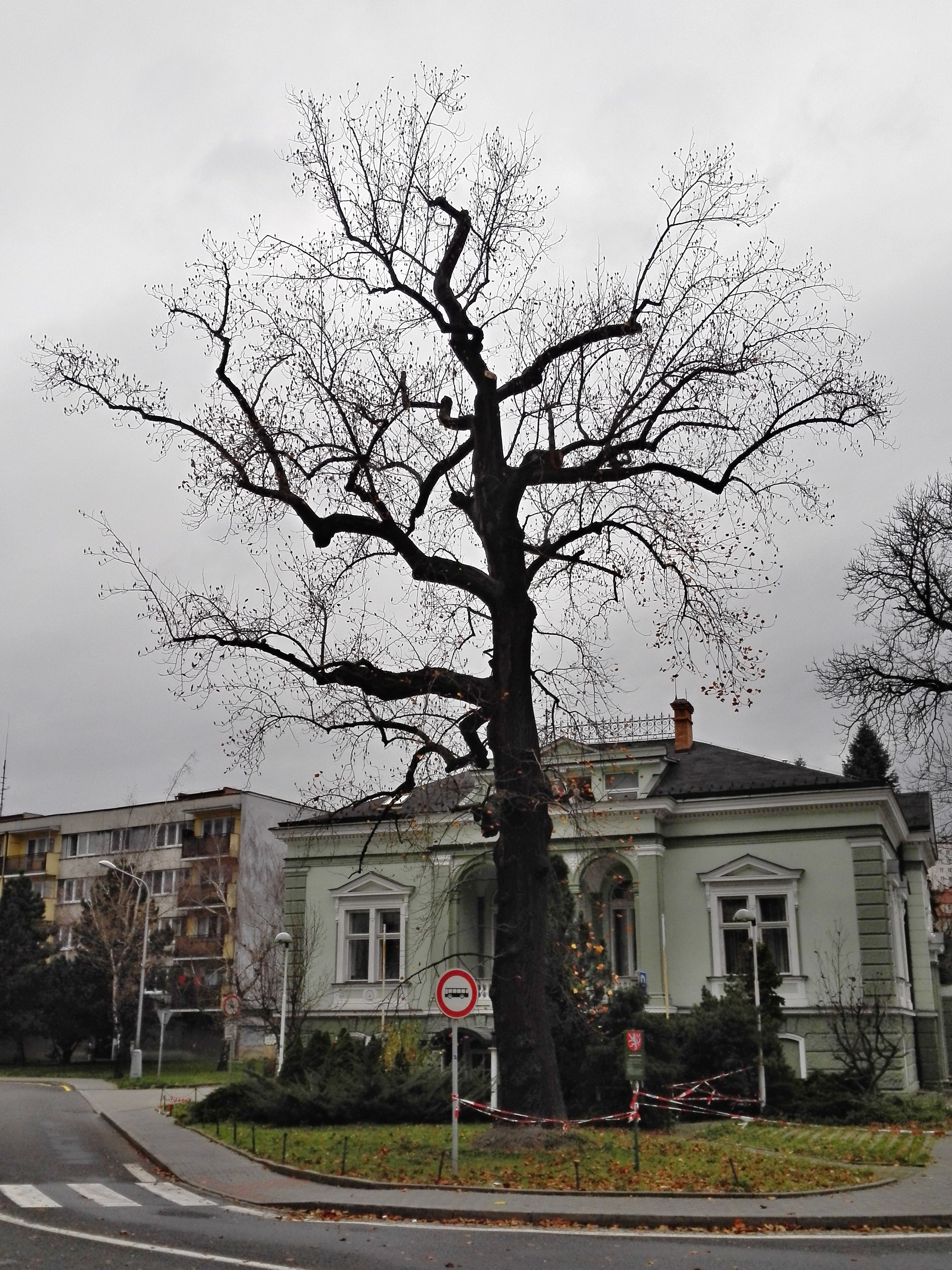 Liliovník v Novém Jičíně